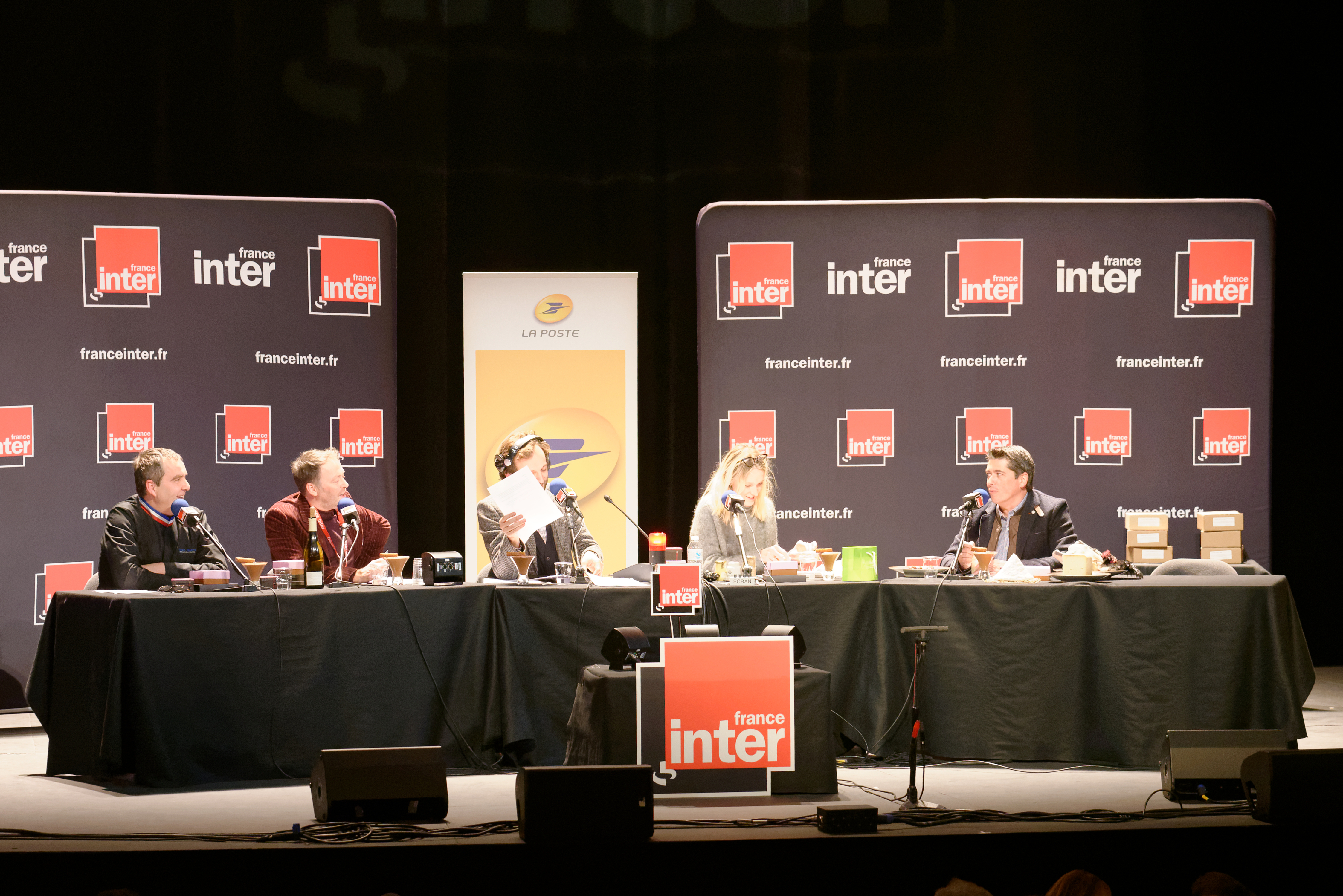 Enregistrement de l'émission "On va déguster", avec le chocolatier Fabrice Gillotte et le restaurateur William Frachot, lors du "Tour de France Inter" à Dijon, le vendredi 22 janvier 2016 au Grand Théâtre de Dijon (Côte d'Or, Bourgogne-Franche Comté, France).